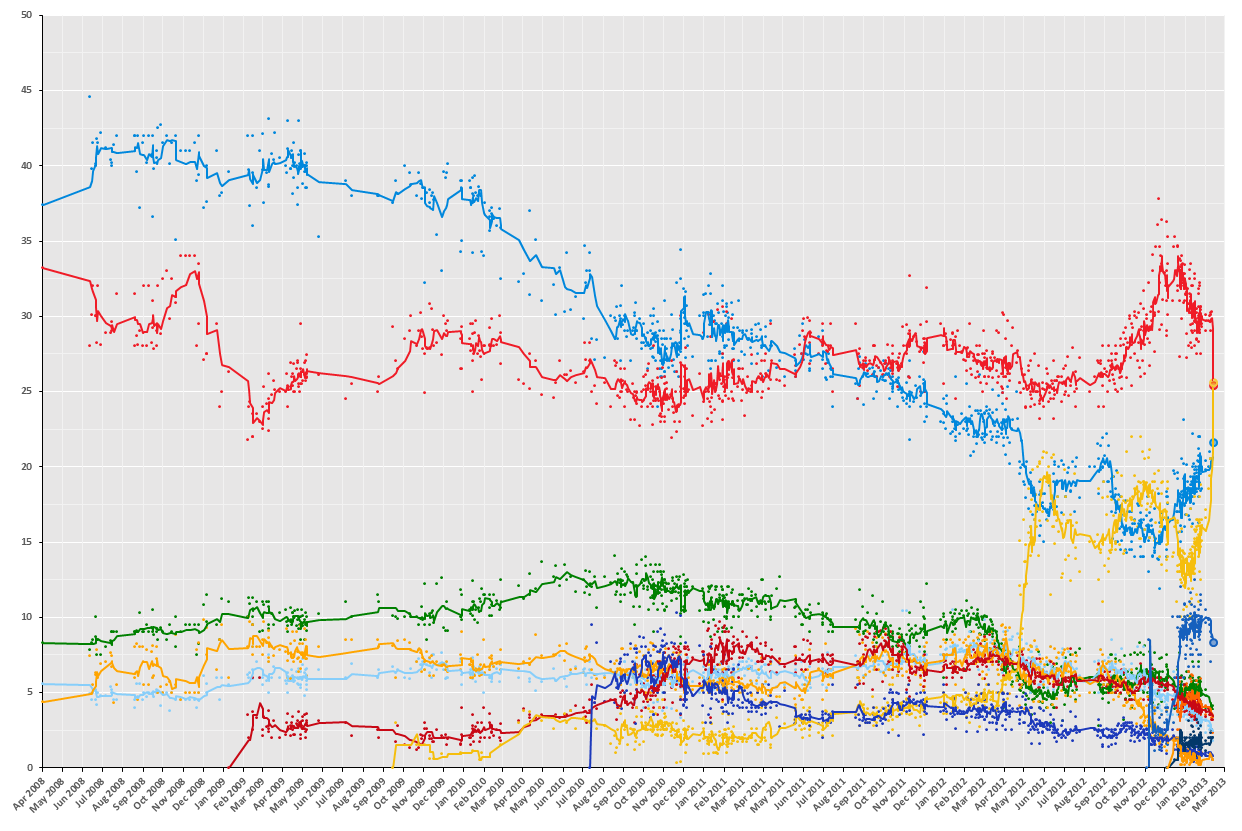 Sondaggi elettorali con media a 15 giorni.